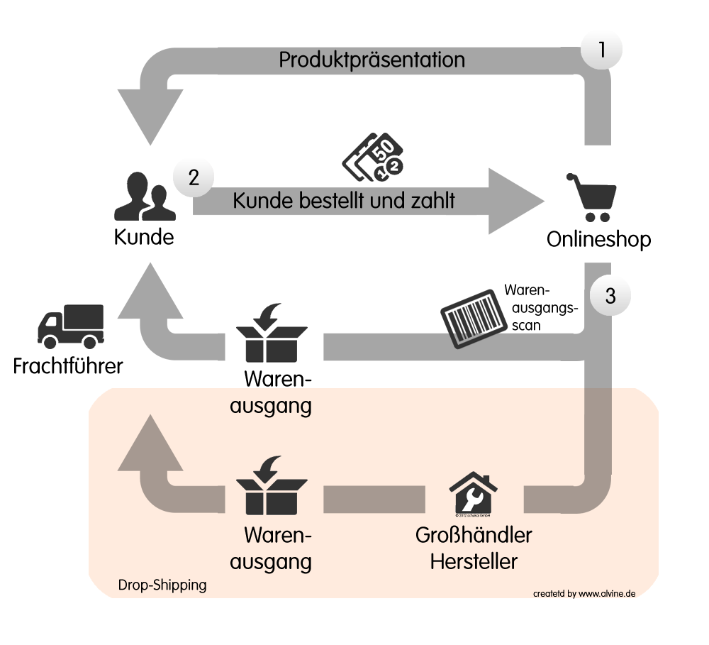 Prozessablauf im Streckengeschäft